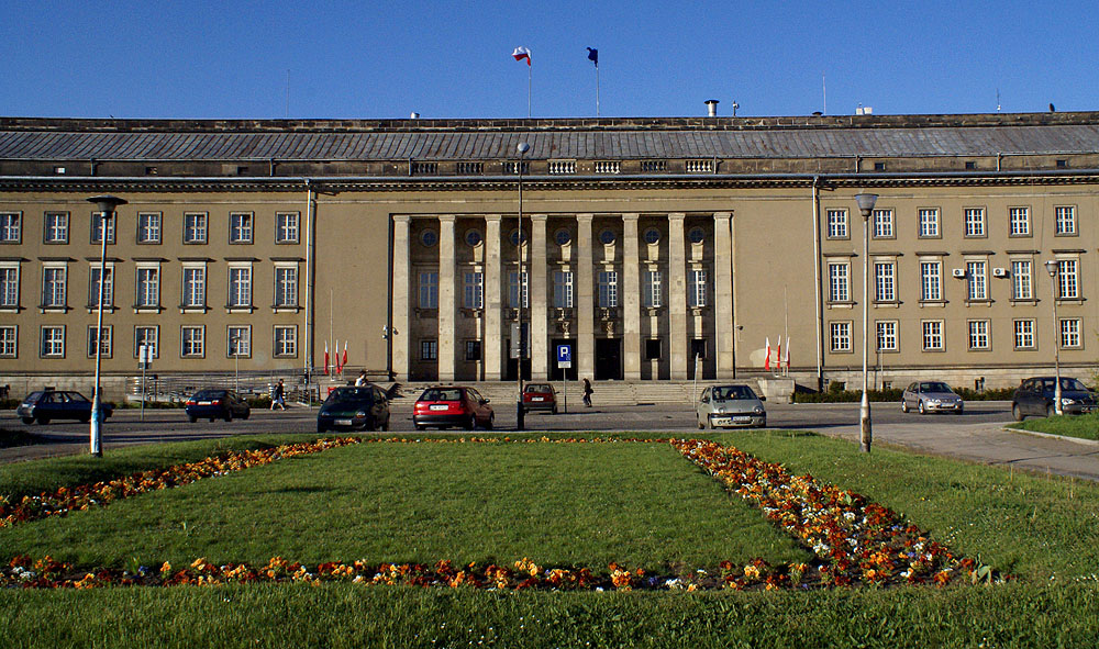 Historyczny układ urbanistyczny Przedmieścia Oławskiego, dzielnicy miasta Wrocław, wraz z archeologicznymi nawarstwieniami kulturowo – osadniczymi w następujących granicach: Od północy: granica przebiega od krawędzi pozostałości fosy miejskiej zwanej „Zatoką Gondol” (dz. nr 9/2), prowadzi południowym nabrzeżem rzeki Odry do ujścia rzeki Oławy. Od wschodu: granica przebiega zach. brzegiem rzeki Oławy do Mostu Rakowieckiego. Od południa: granica biegnie ulicą od wylotu Mostu Rakowieckiego do ulicy Kościuszki, pn. granica działki nr 4/65 ujmując zabudowę w kwartałach wyznaczonych ulicami Chudoby - Więckowskiego - Świstackiego - Prądzyńskiego -Brzeska. Następnie po pn. i wsch. granicy działki 4/14, drogi 4/17, ujmuje zabudowę na dz. 4/65 i 4/54, dochodzi do wiaduktu kolejowego przy ul. Pułaskiego, ujmuje zabudowę po pd. stronie ul. Małachowskiego. Od zachodu: wzdłuż ul. Dworcowej, ul. Podwale do al. Słowackiego, następnie biegnie wschodnią granica zasypanego odcinka fosy miejskiej (na dz. 20/5) do „Zatoki Gondol” (dz. 9/2 i rzeki Odry. Przedmieście Oławskie, Miasto Wrocław - Krzyki